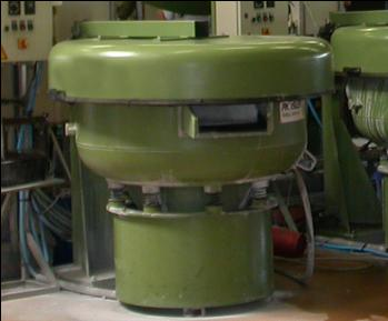 Machine de trovalisation (type Grana)